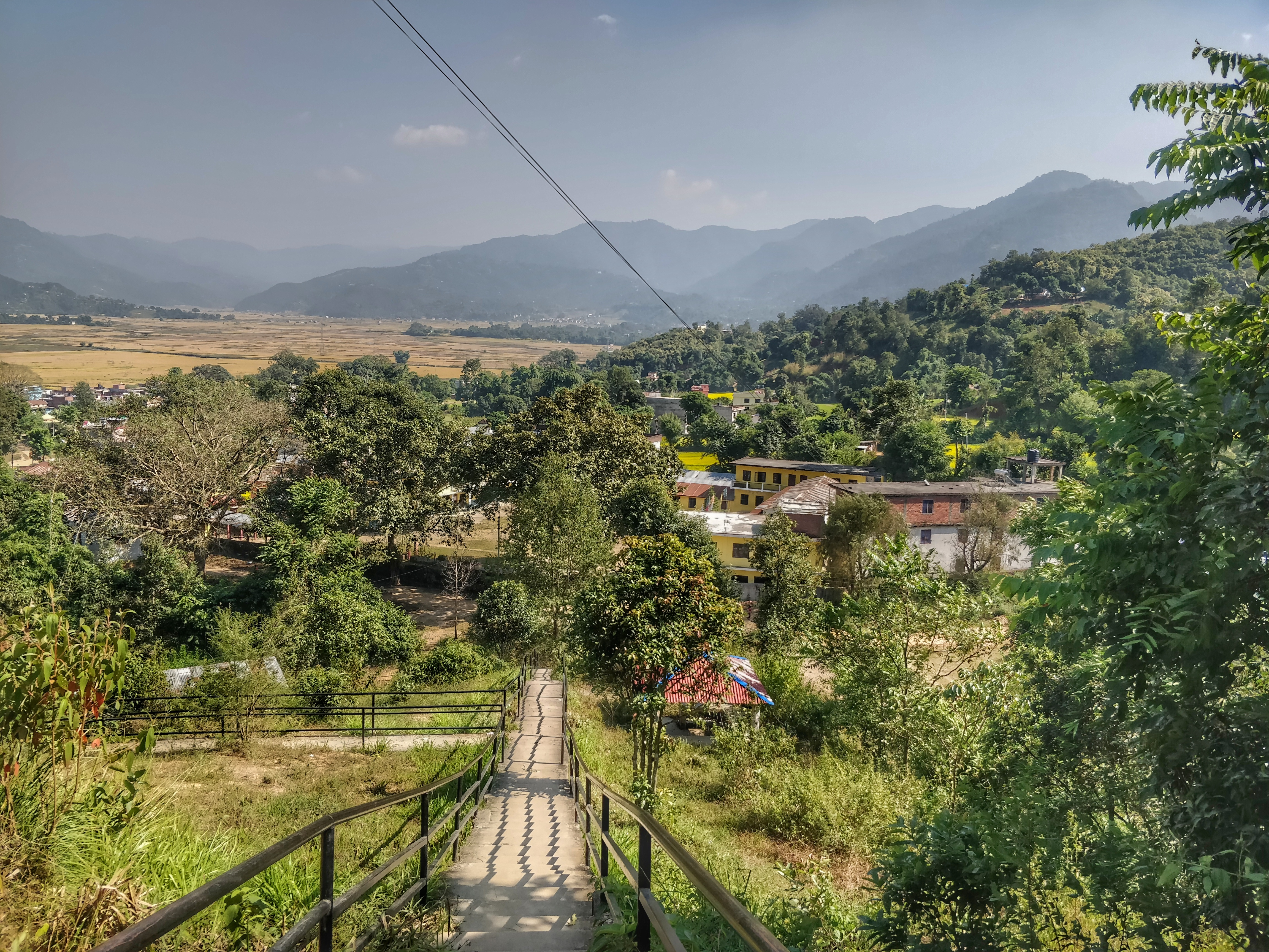 नेपाली: धान काटने समयमा पाल्पा माडीफाट र दमकडा बजार ।